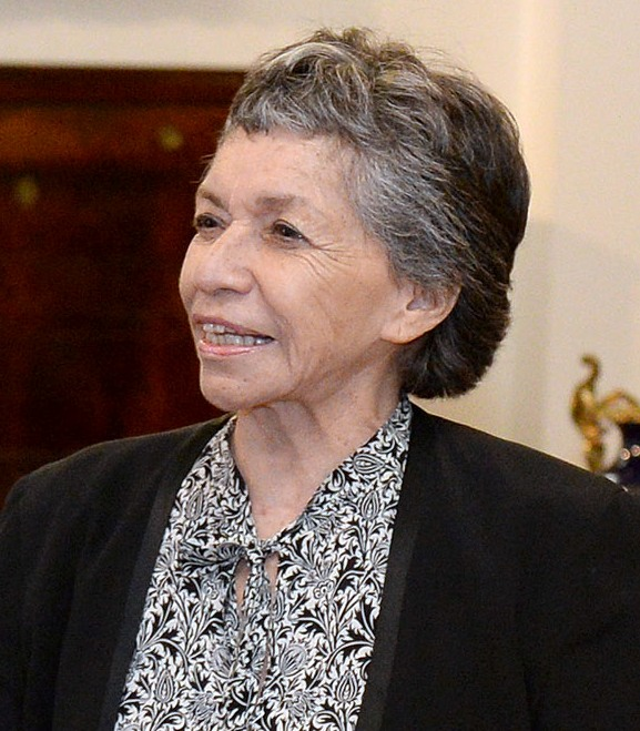 Isabel Parra